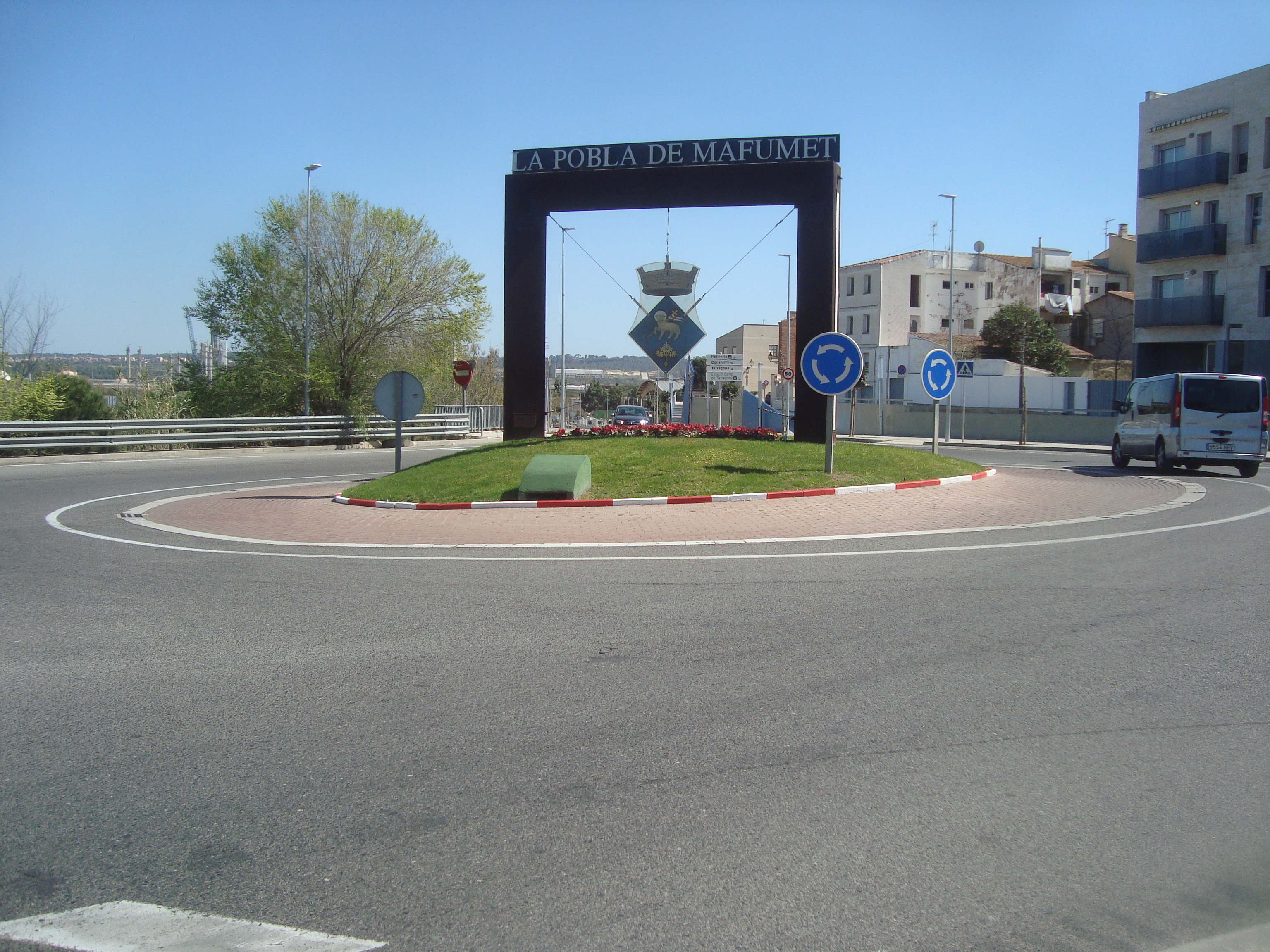 Acceso vial a la Pobla de Mafumet (Tarragona).